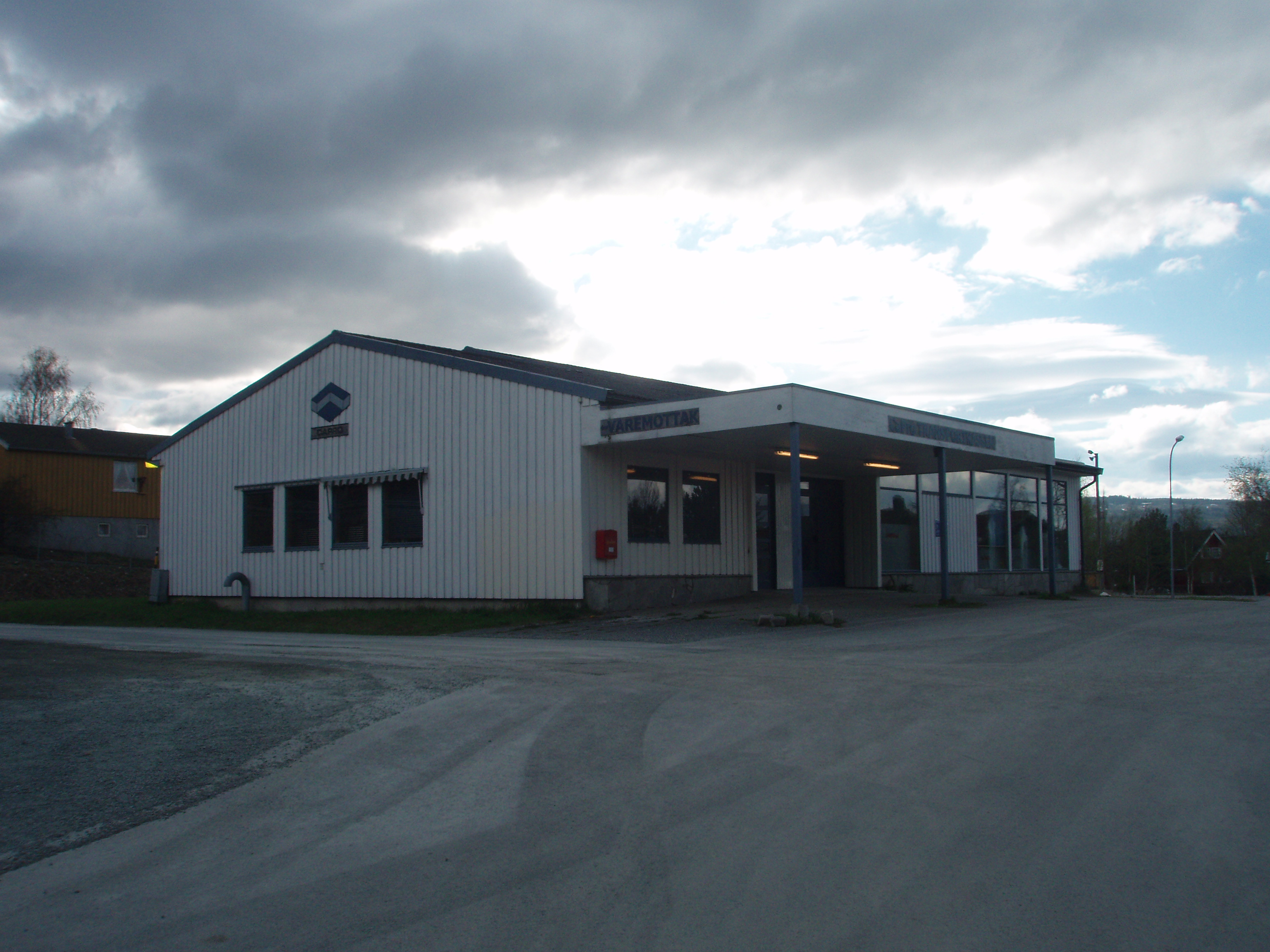 Capro, som lager transportkasser, sine lokaler på Gimse i Melhus